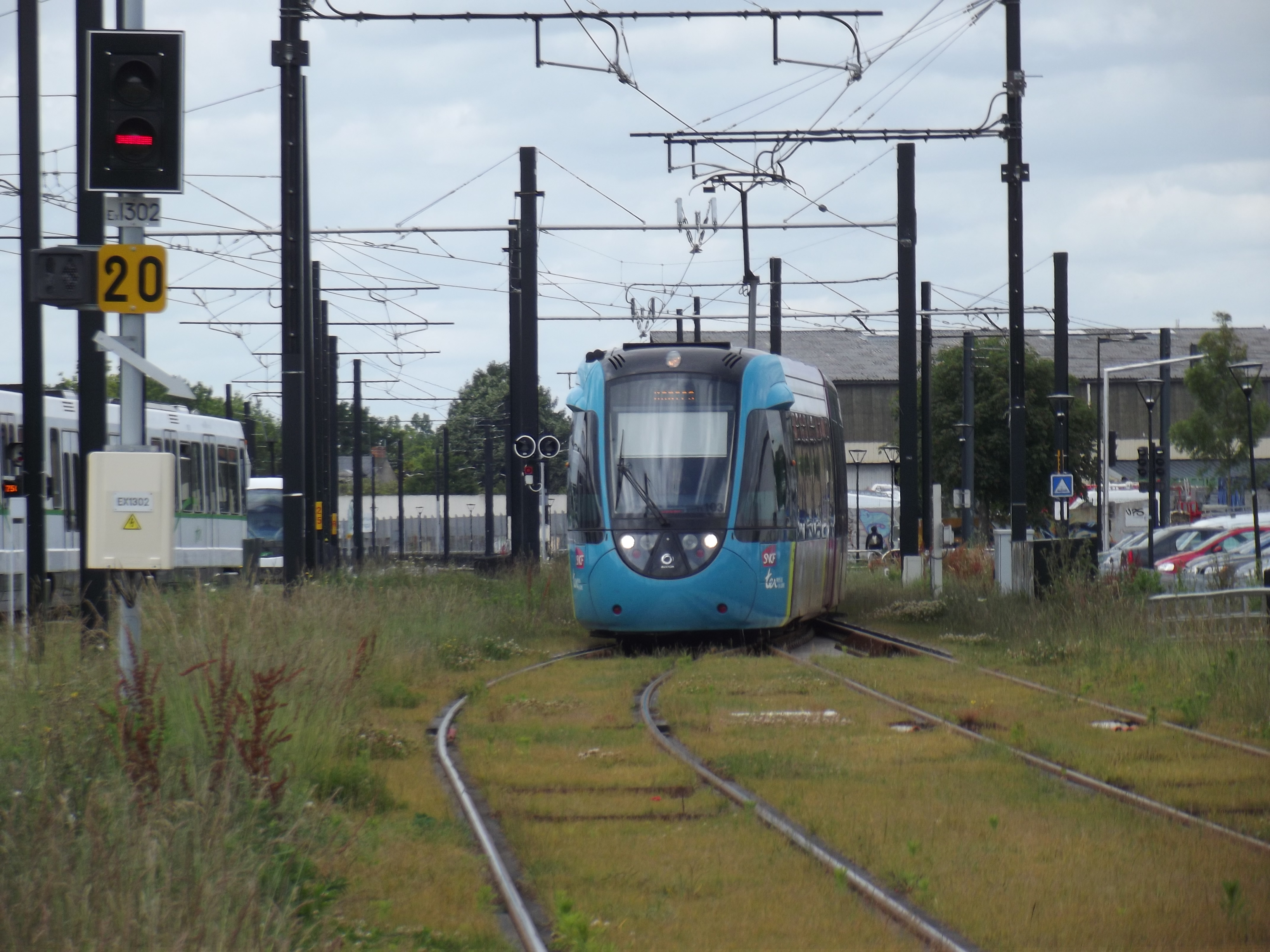 Aankomende tram-trein in Haluchère Batignolles richting stad